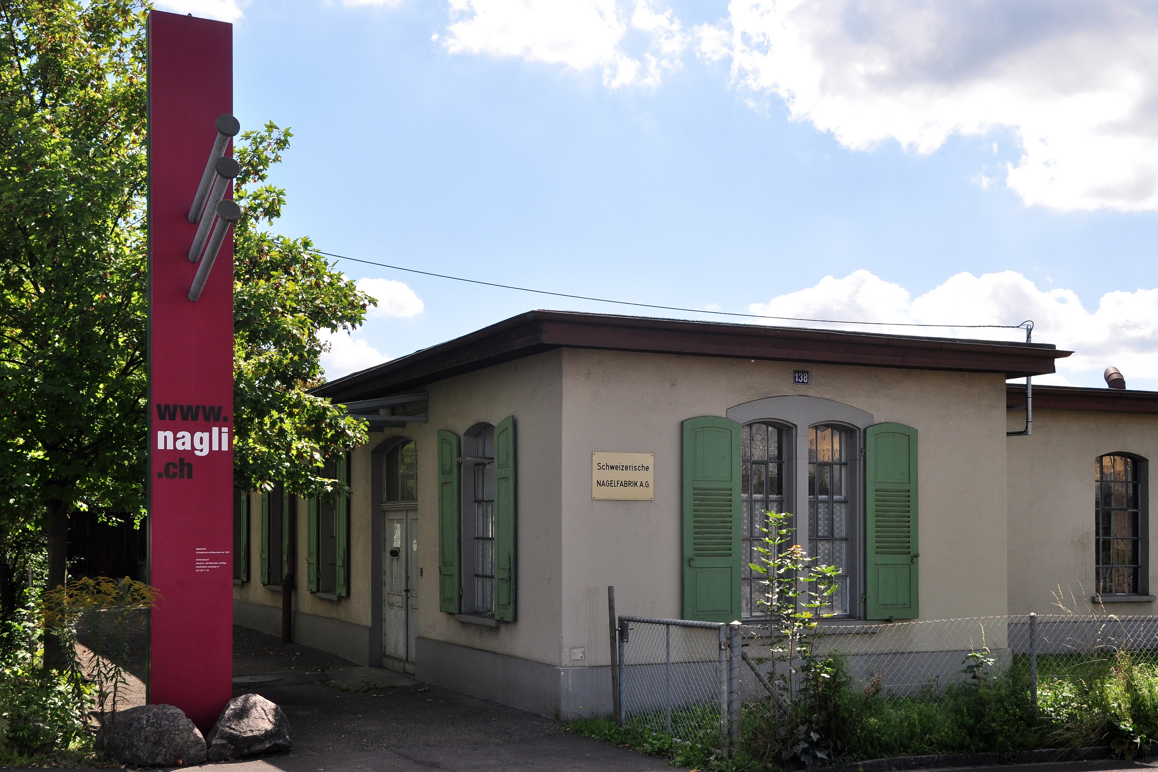 Maschinenpark der Nagelfabrik, St. Gallerstrasse 138 in Winterthur (Switzerland)